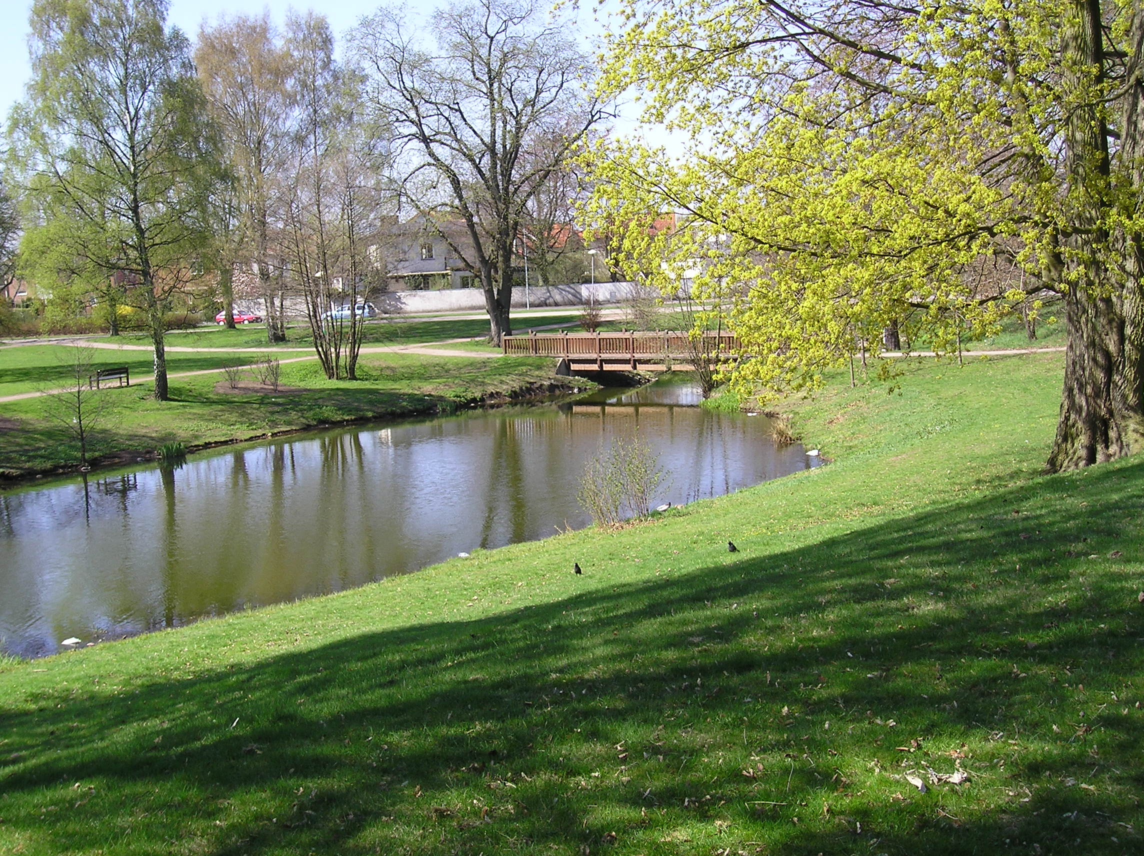 View of "Slottsparken" in Halmstad, Sweden